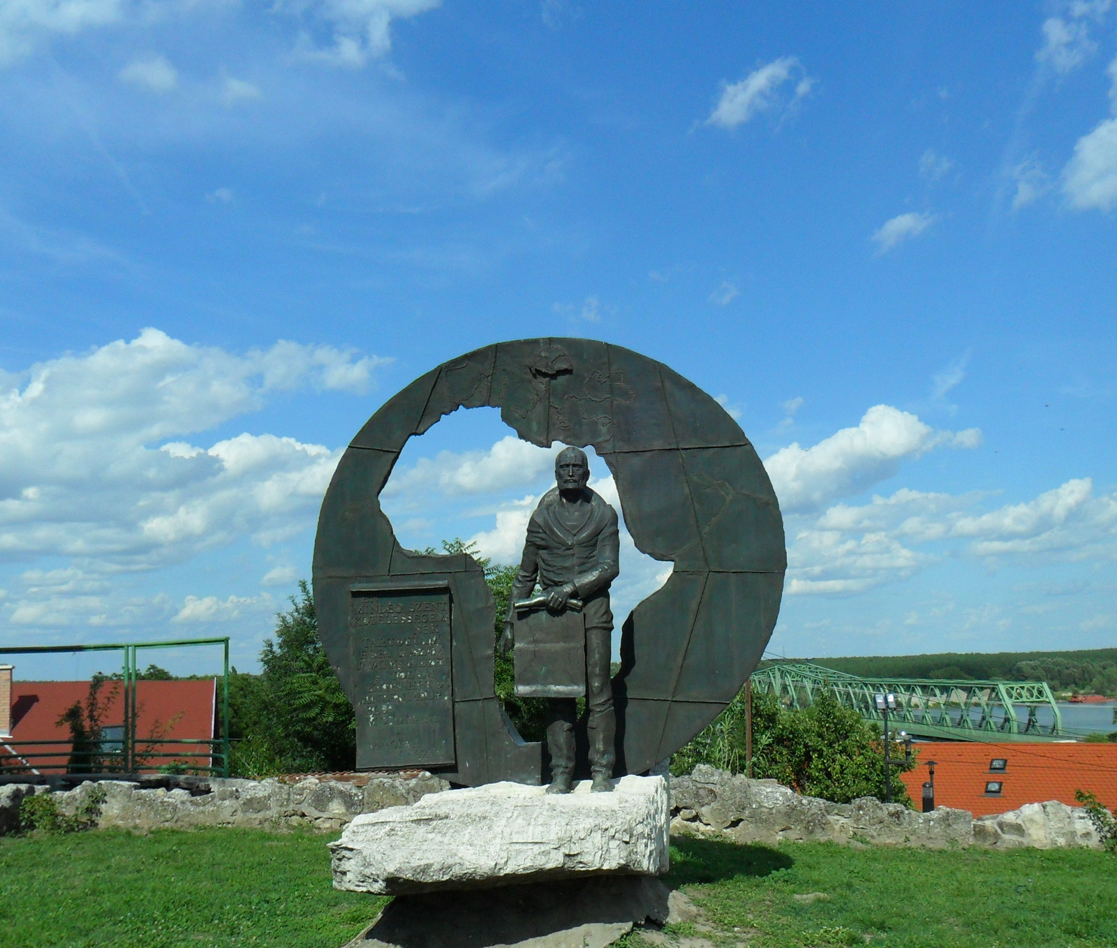 U.n. Török torony (Dunaföldvár, Rátkay köz) This is a photo of a monument in Hungary. Identifier: 8605